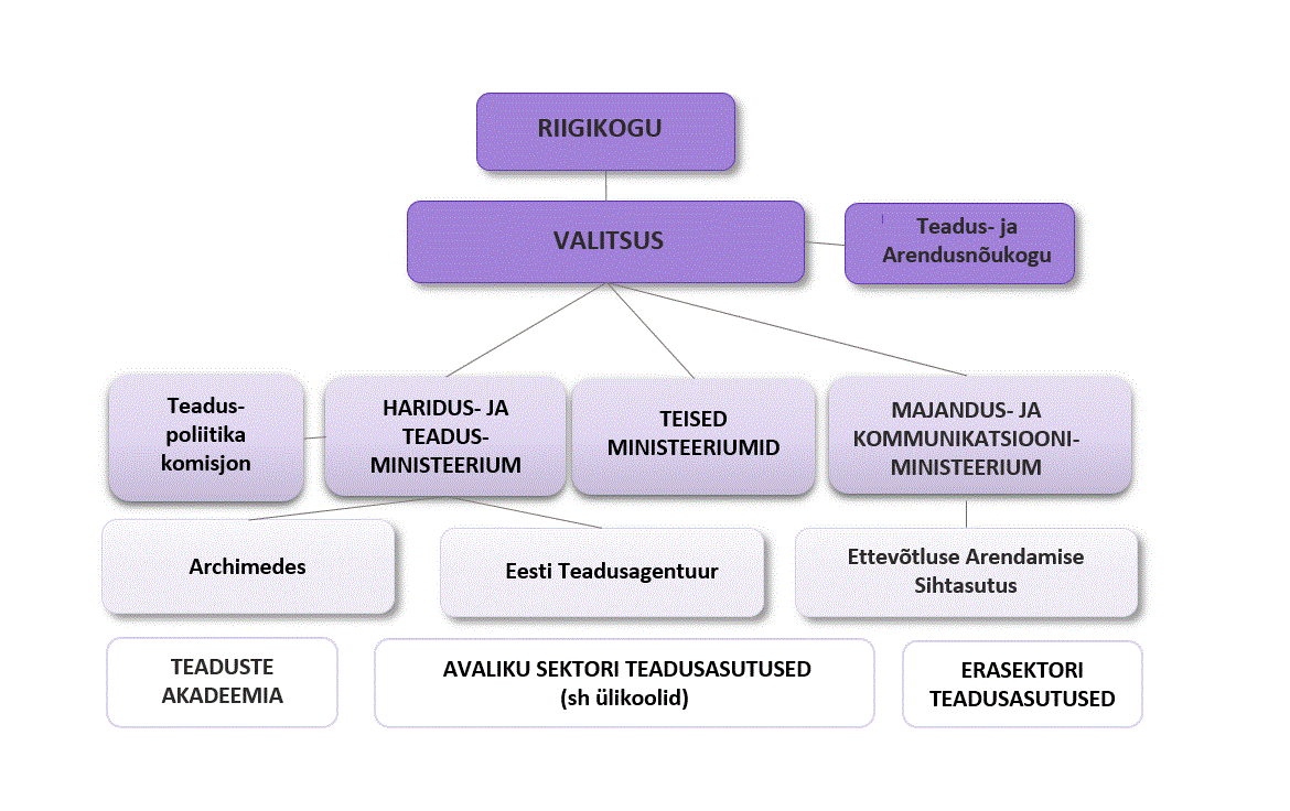 Eesti teadus- ja arendustegevuse organisatsiooniline struktuur